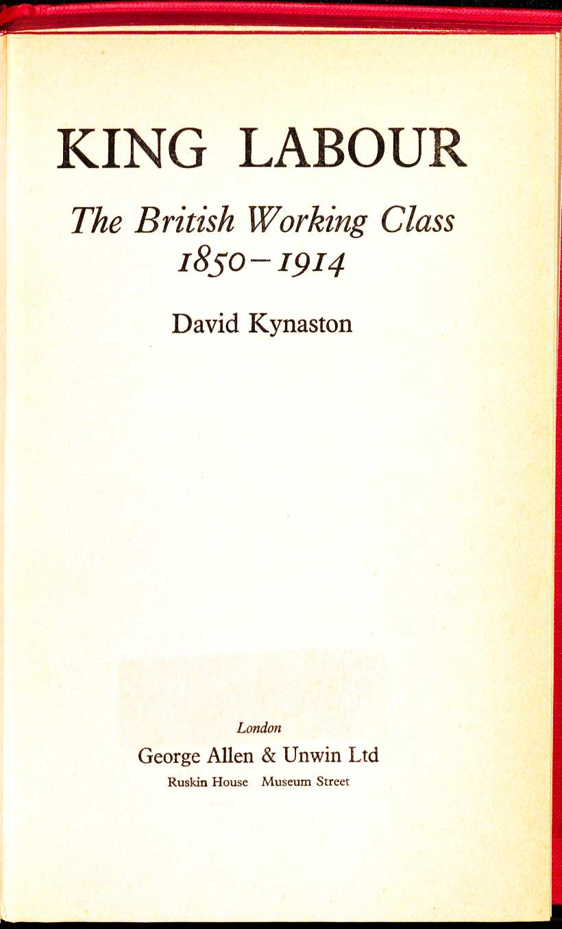 David Kynaston King Labour 1976 Title